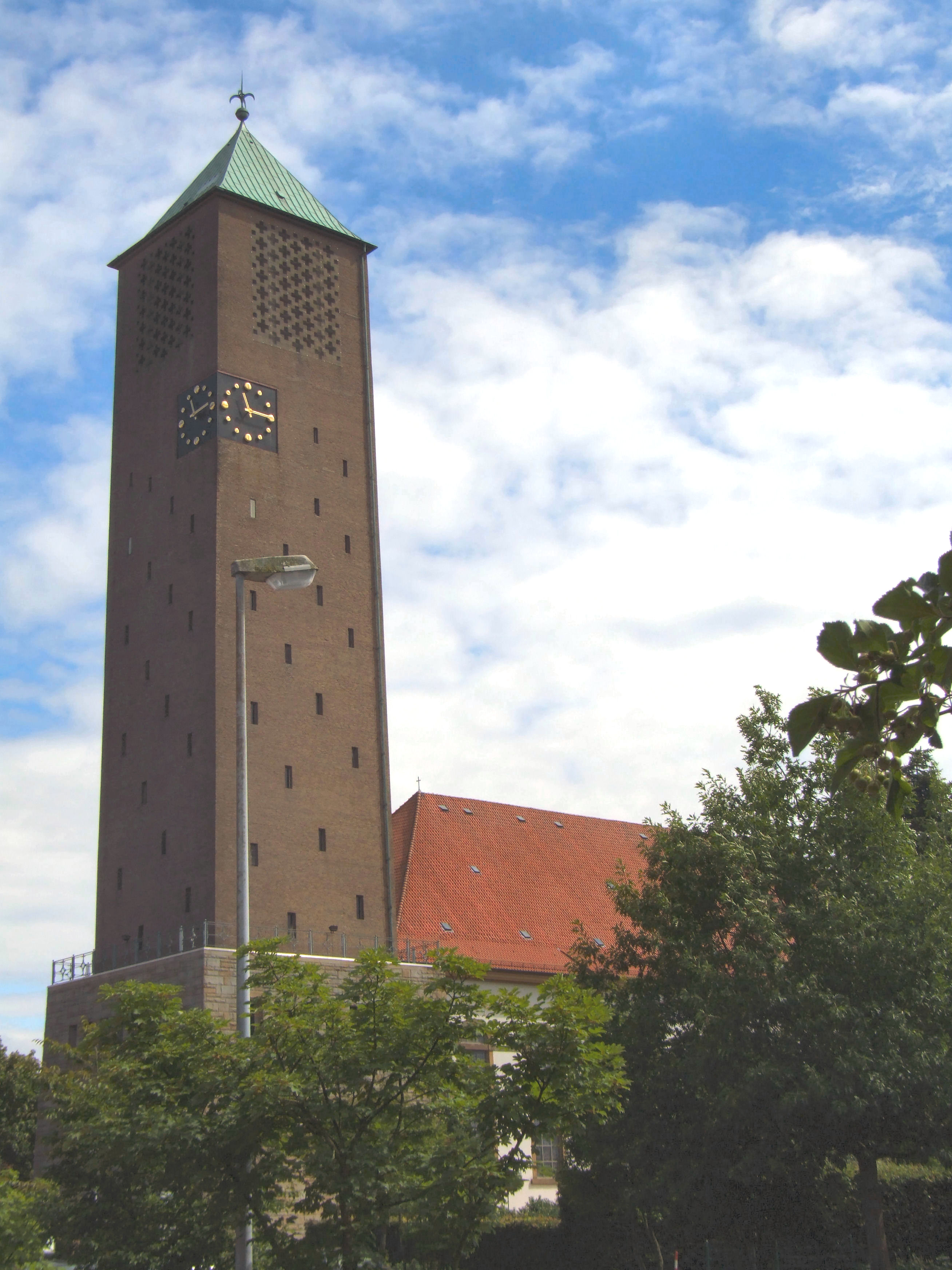 Pfarrkirche St. Vitus in Löningen